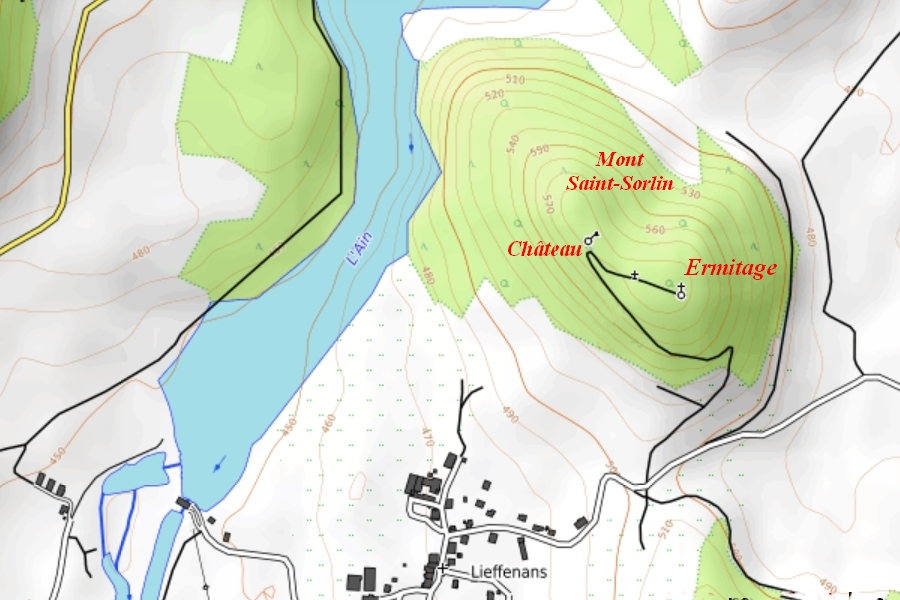 Carte simplifiée du mont Saint-Sorlin à Charézier, Jura